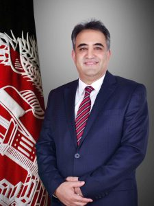 embassy